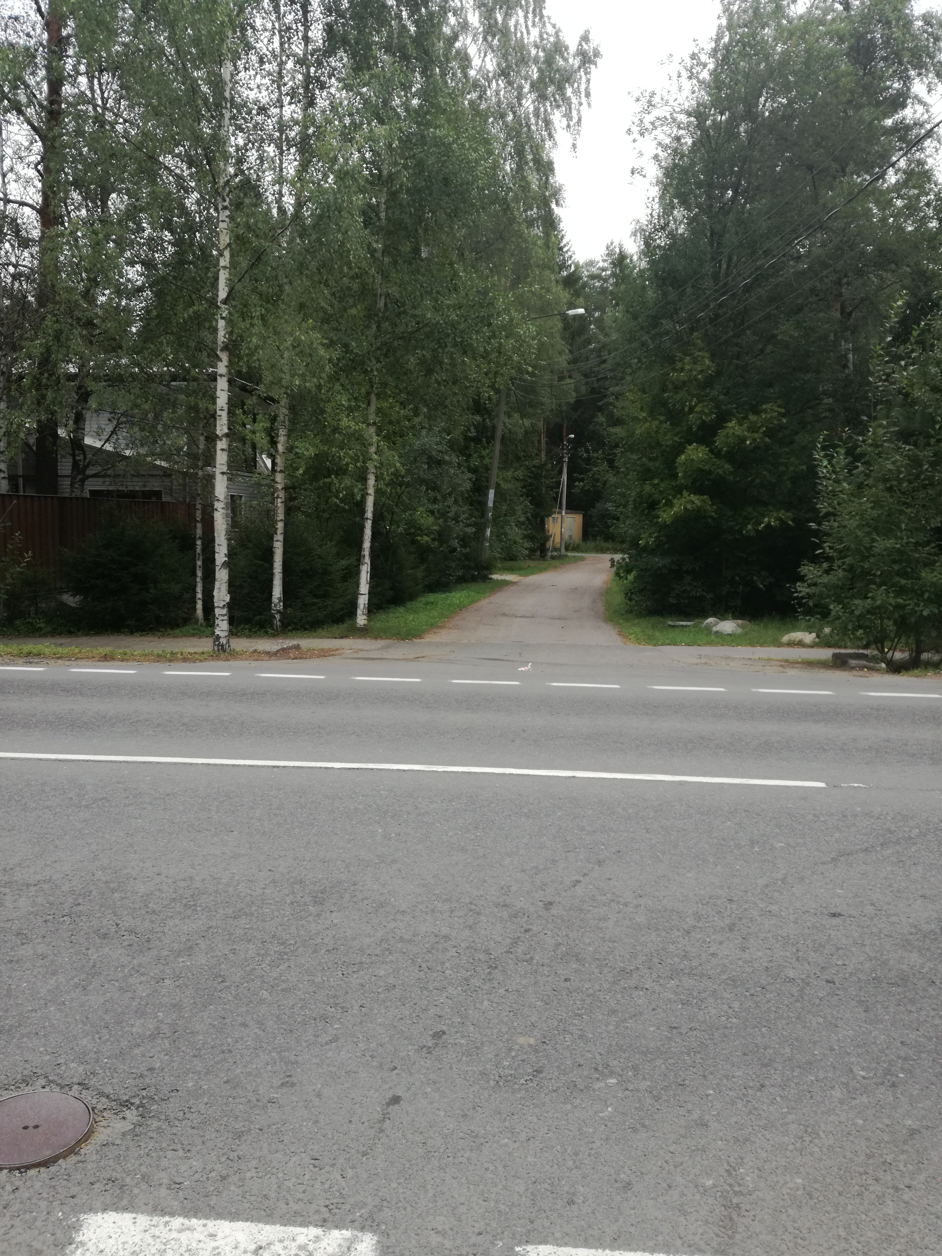 Перекрёсток Рабочей и Советской улицы, Песочный